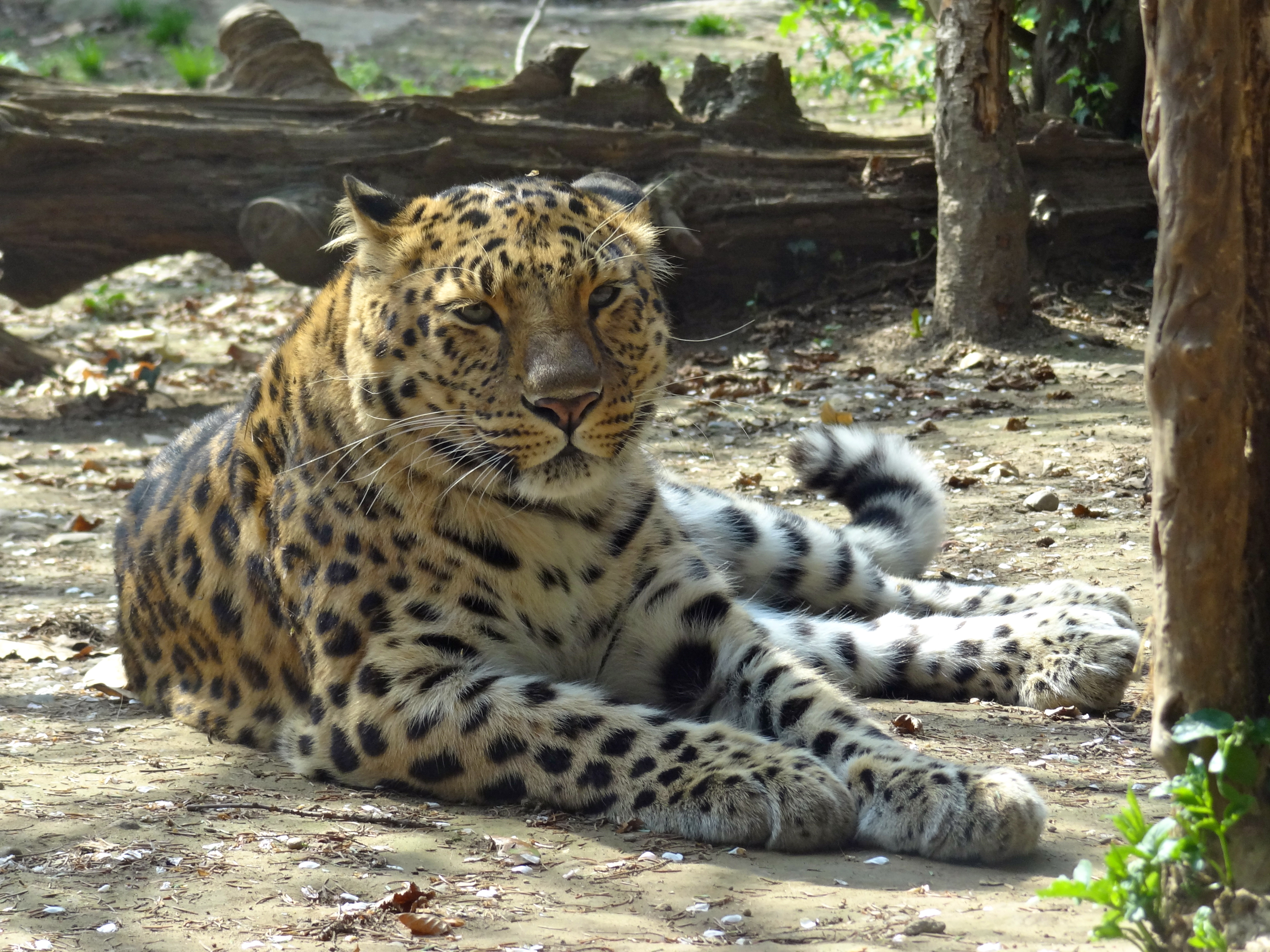 Esemplare di leopardo dell'Amur (Panthera pardus orientalis), al Parco Faunistico "La Torbiera" - Agrate Conturbia (NO)